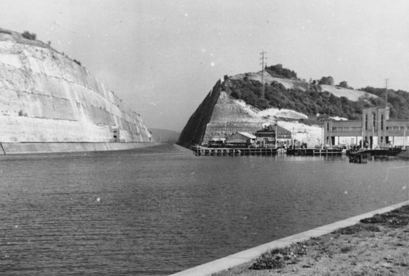 Der befestigte Albert-Kanal an der belgisch-holländischen Grenze bei Maastricht. 10. 5. 1940